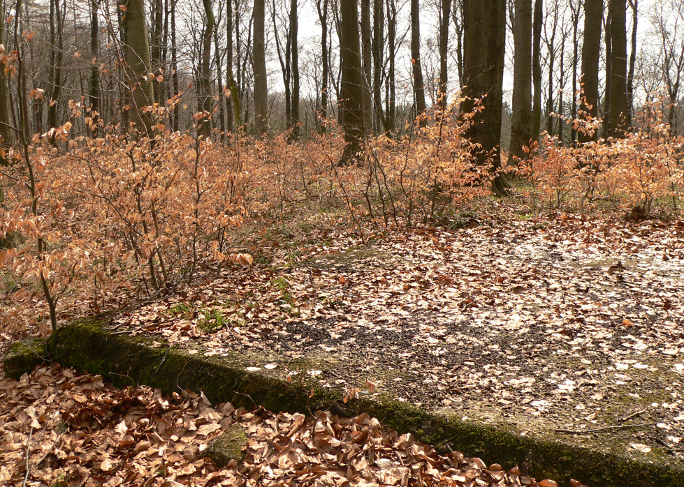 Betonplattform auf dem Gipfel des Süllberg